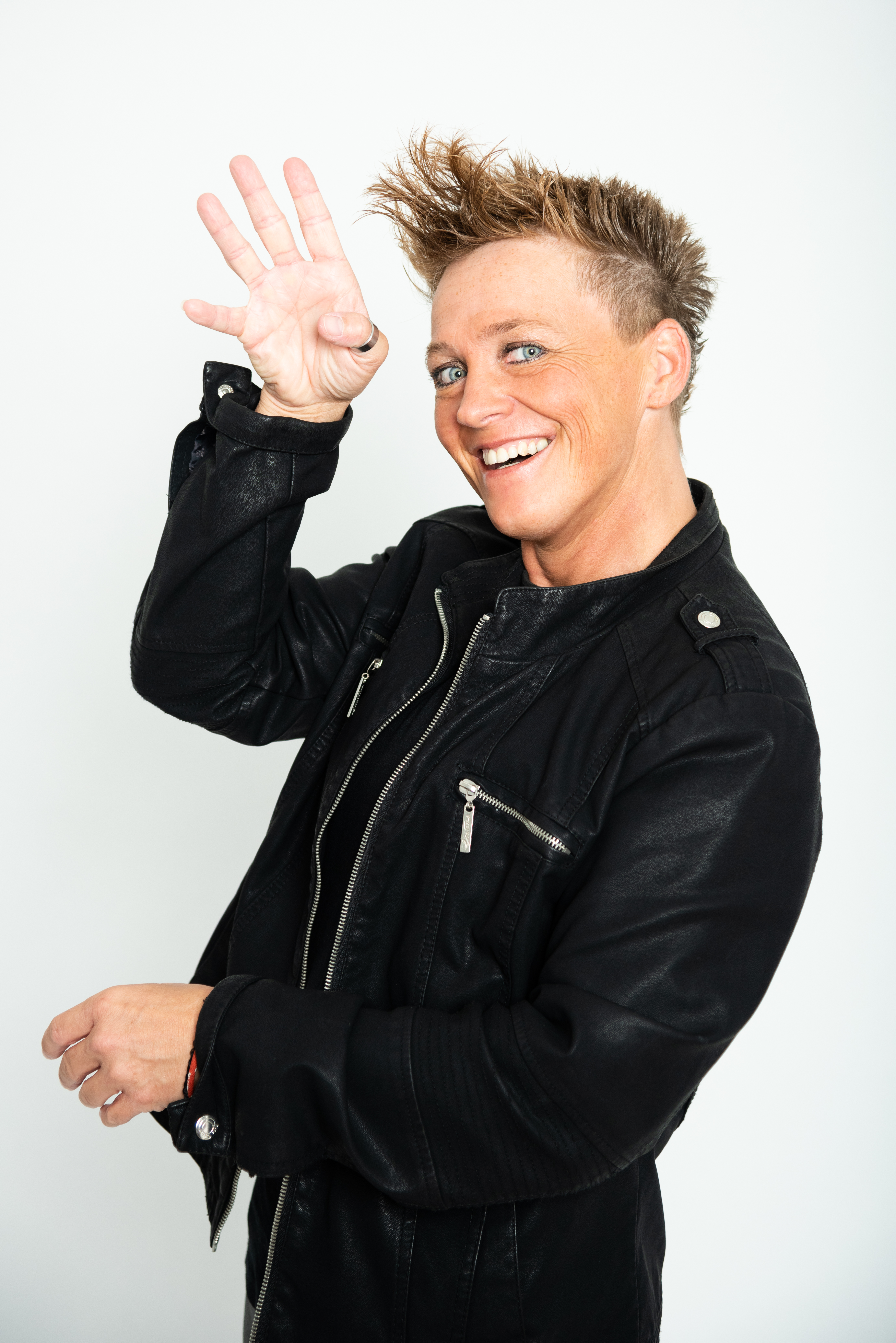 Tina Schüssler beim TV-Dreh mit Sky Deutschland